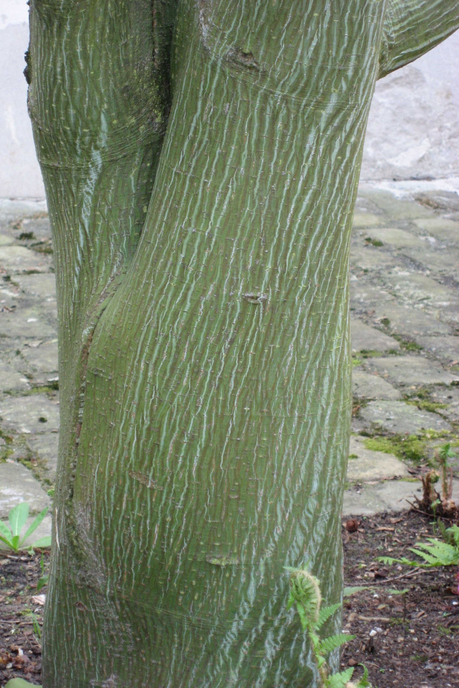 Tronc de Acer davidii 'Ernest Wilson' Franch. (Erable du Père David (cultivar)) in Arboretum de la Vallée-aux-Loups Map: 48° 46' 22" N 2° 16' 5" E